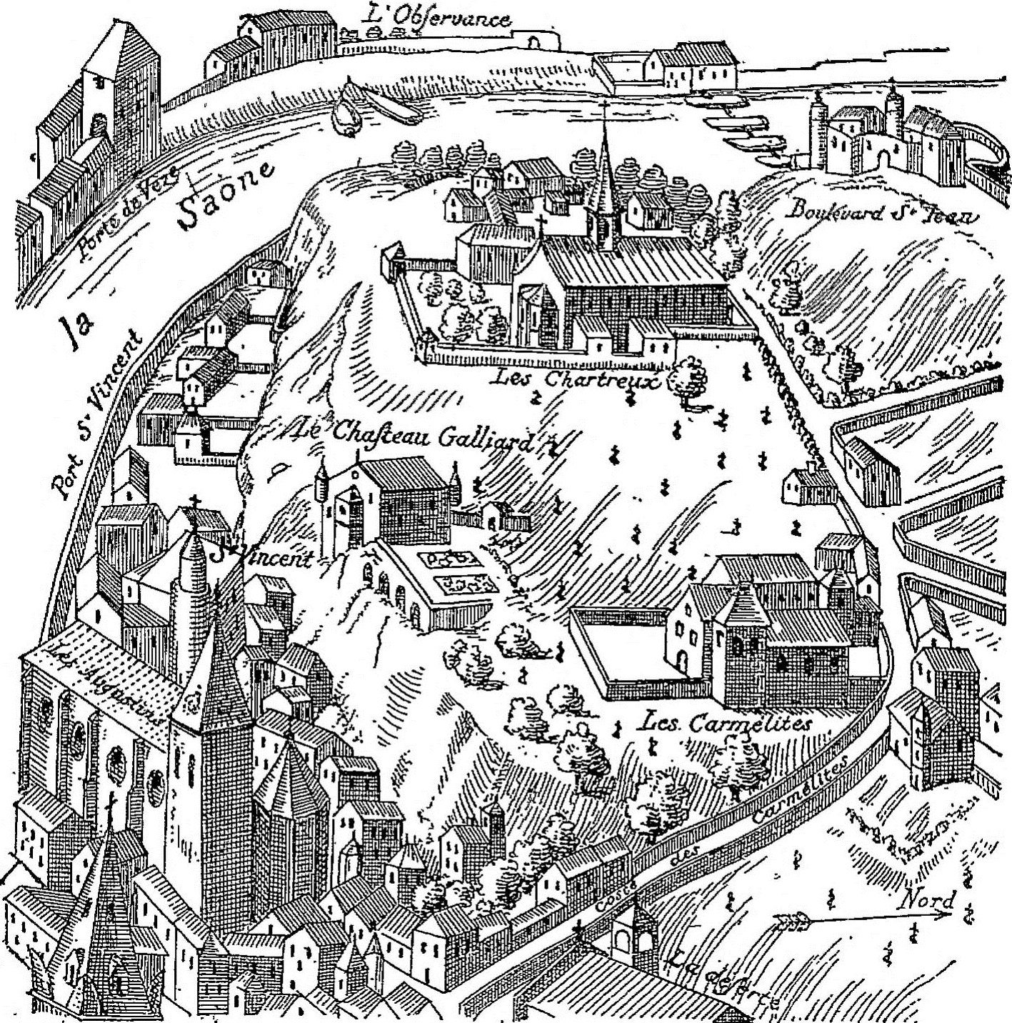 Illustration de l'ouvrage « Les anciens couvents de Lyon » (1895) par Adolphe Vachet